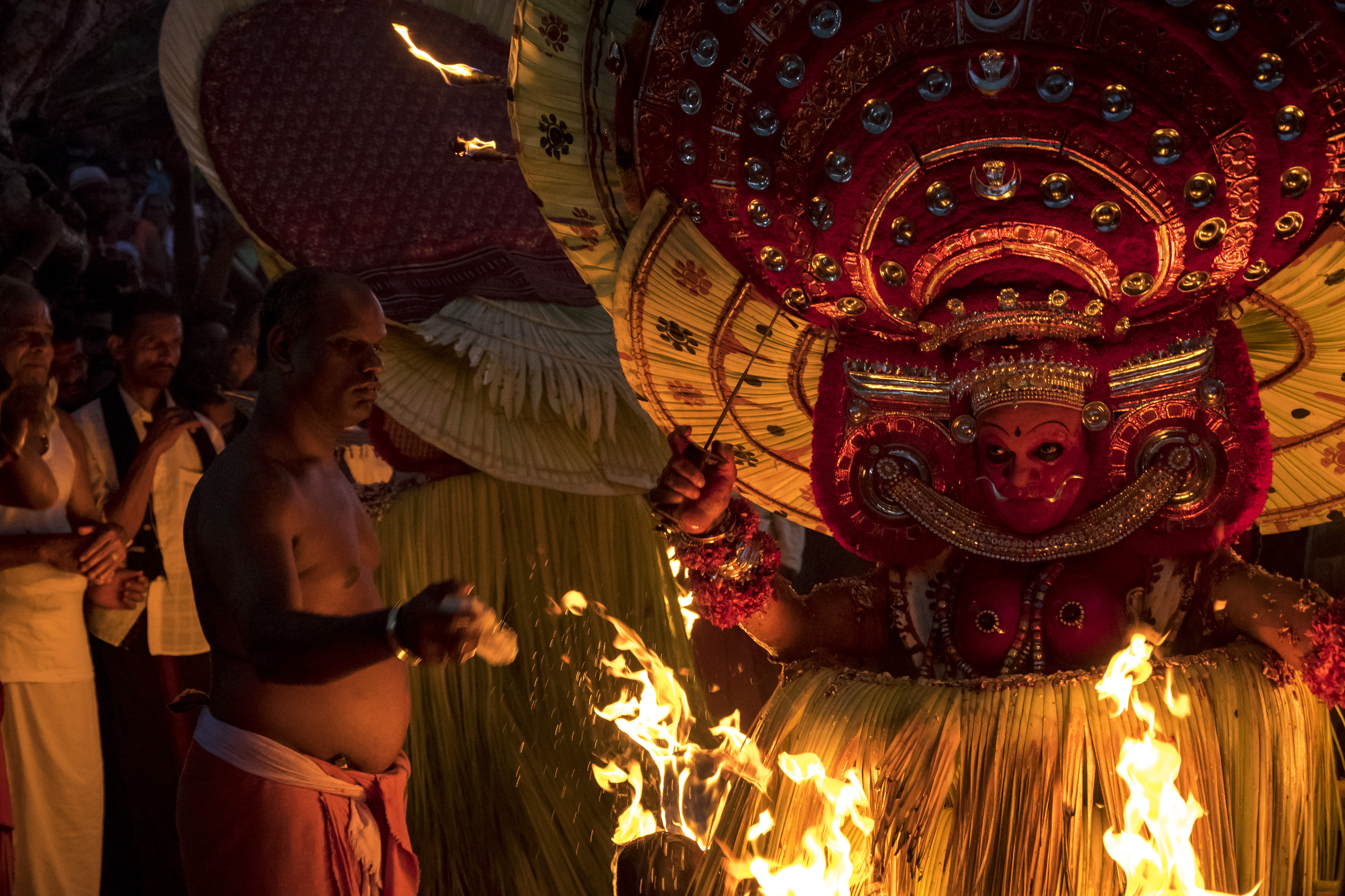 Kadavaankott maakkam Thira at Chala, Kannur